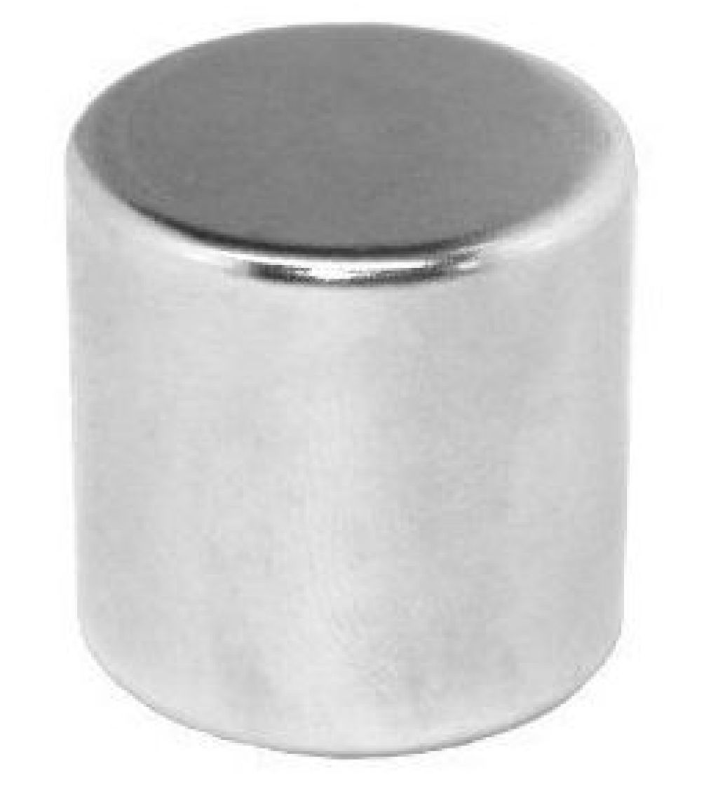 Aimant